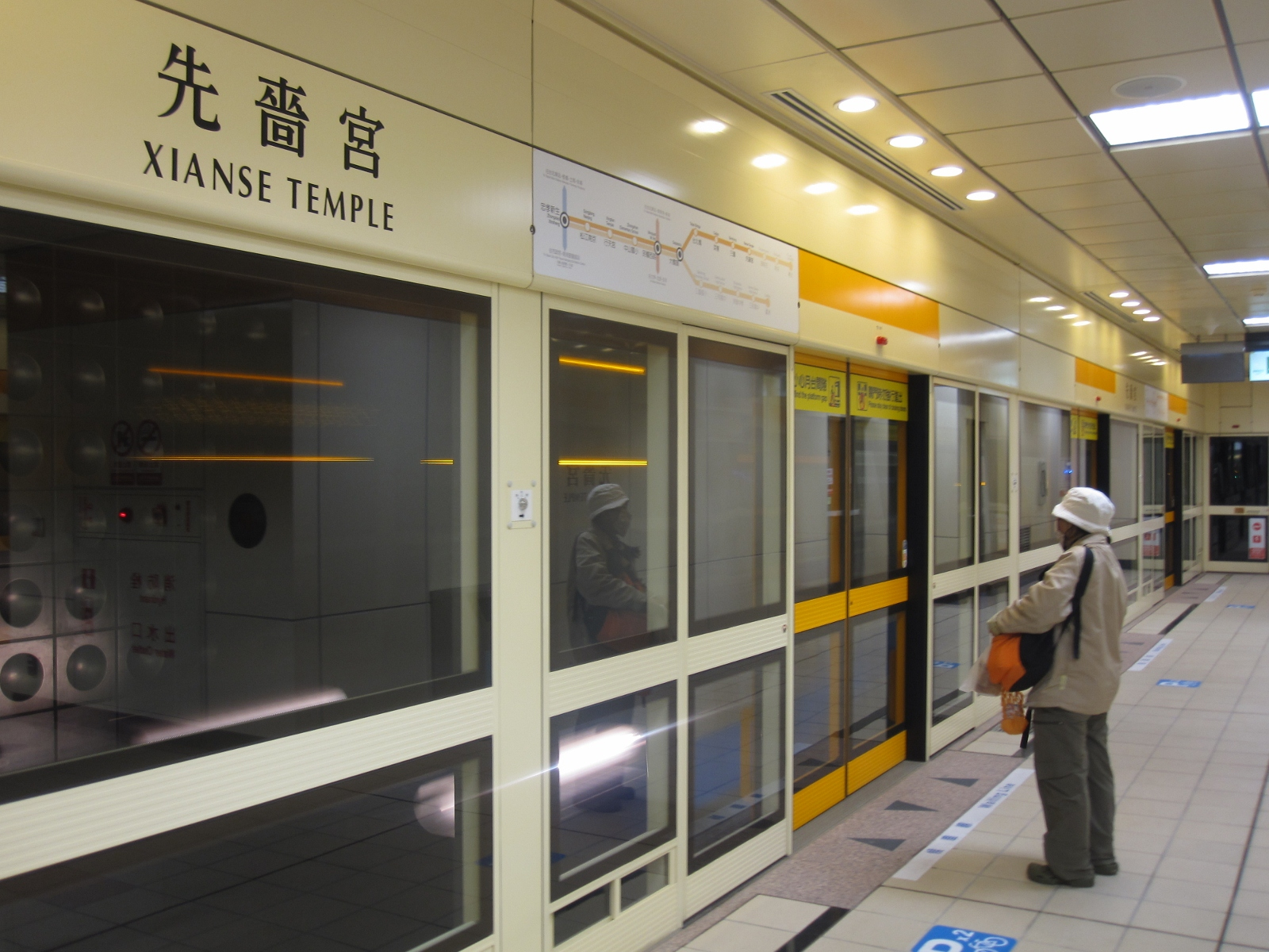 先嗇宮站月台2